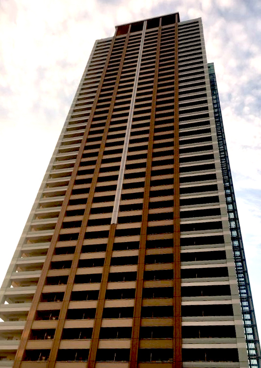 ilink市川